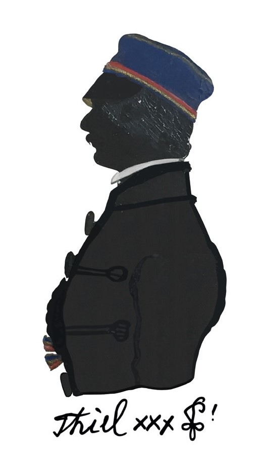 Silhouettevon Rudolf Thiel als Student in Leipzig